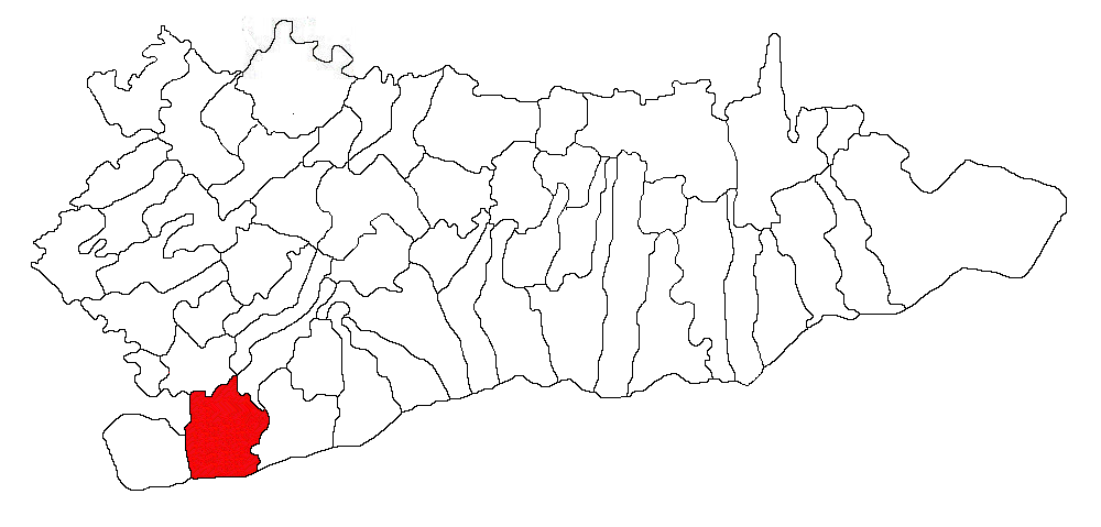 Categorie:Hărţi ale judeţului Călăraşi